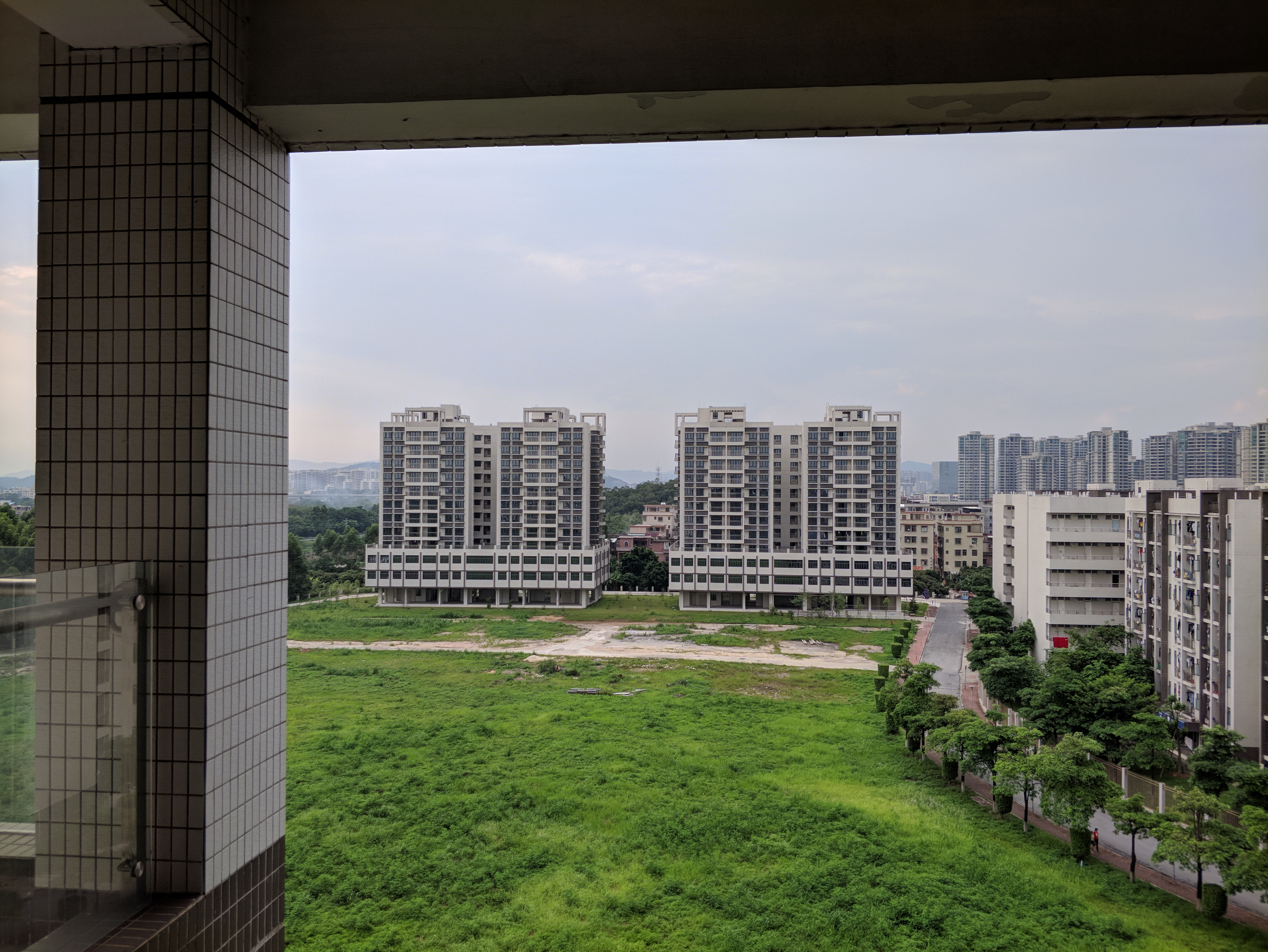 中文（中国大陆）: 位于广东第二师范学院花都校区教学楼七楼所拍, 正前方远处两栋建筑为新建学生宿舍, 以及尚未有建筑的荒地, 右侧为校道以及老宿舍区的男生宿舍第三栋